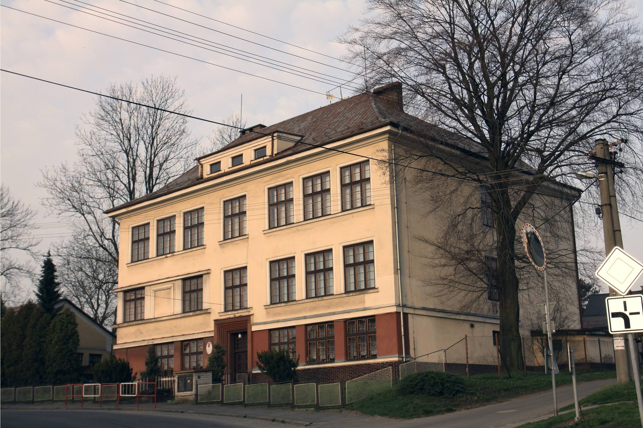 PSP Lutynia Dolna